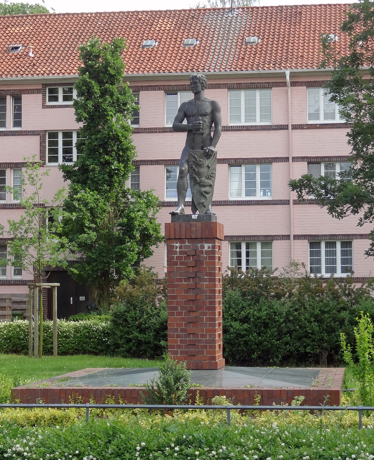 Standbild auf dem Burgundenplatz / an der Siegfriedstraße - Titel und Schöpfer unbekannt.